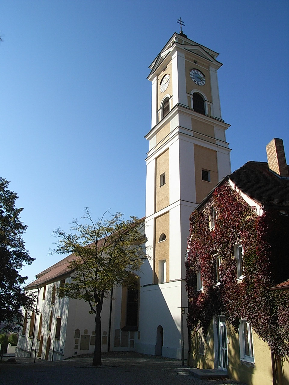 Pfarrkirche Bad Birnbach